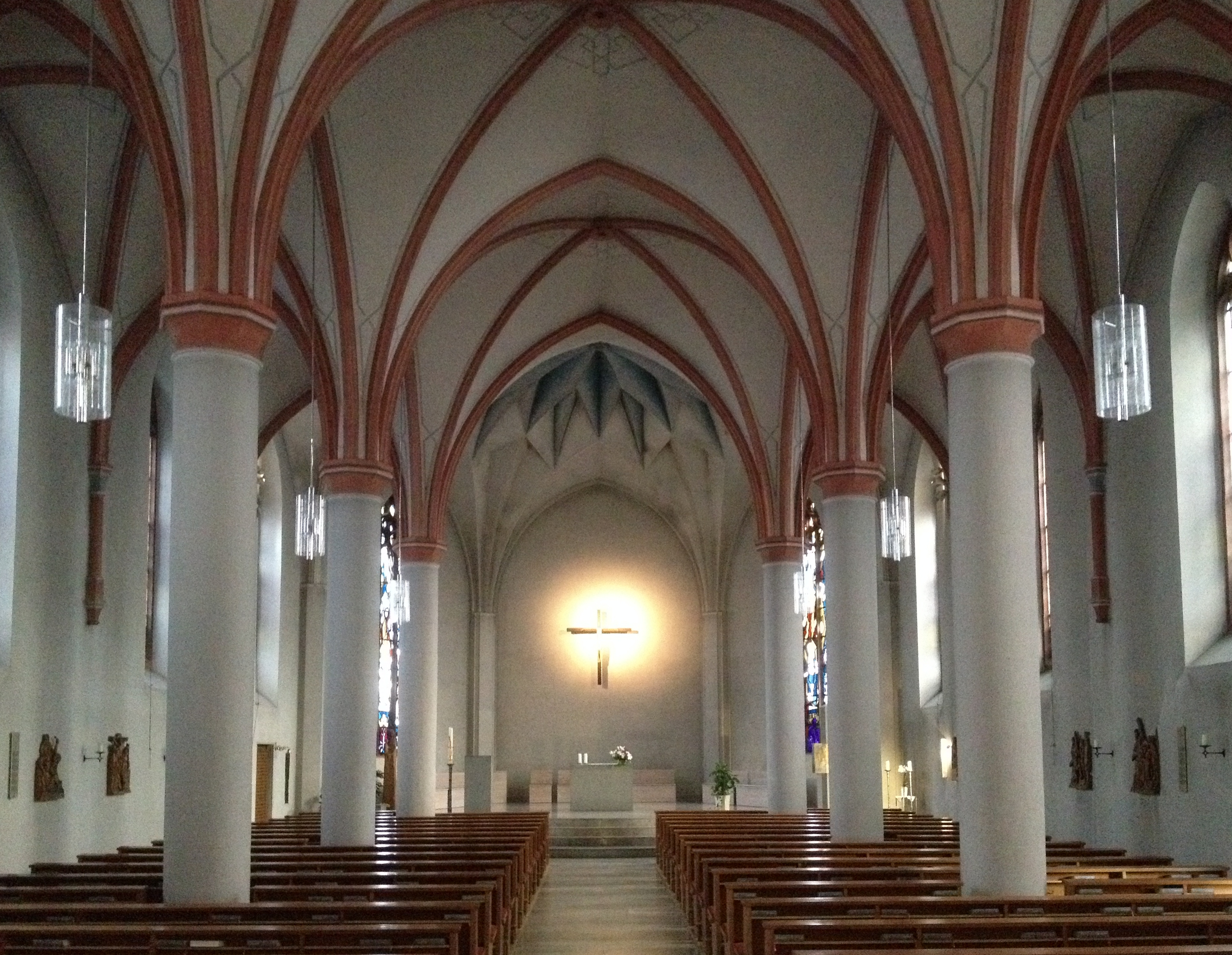 Bad Pyrmont, kath. Kirche St. Georg